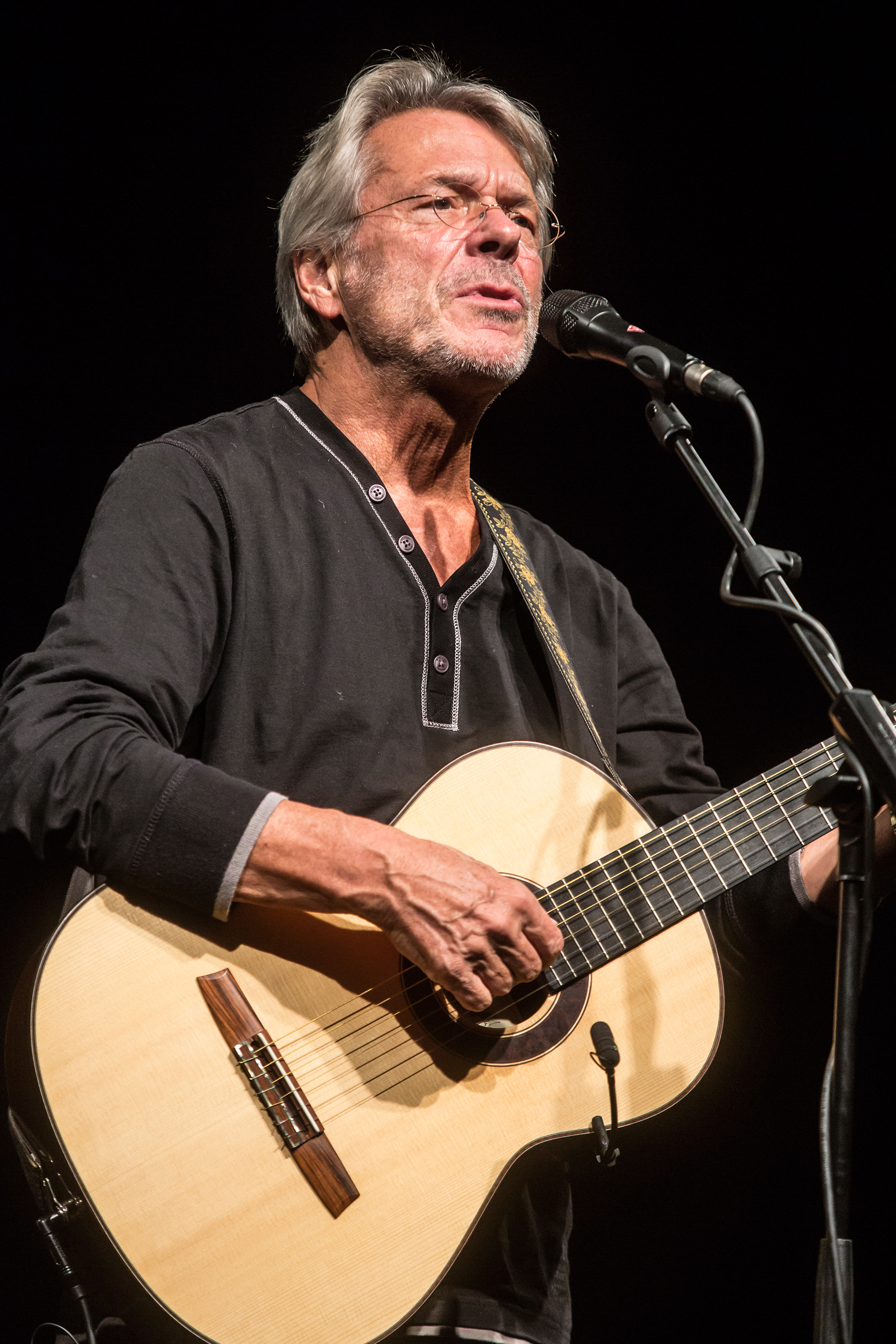 Der deutsche Musiker Reinhard Mey in der Jahrhunderthalle Frankfurt.